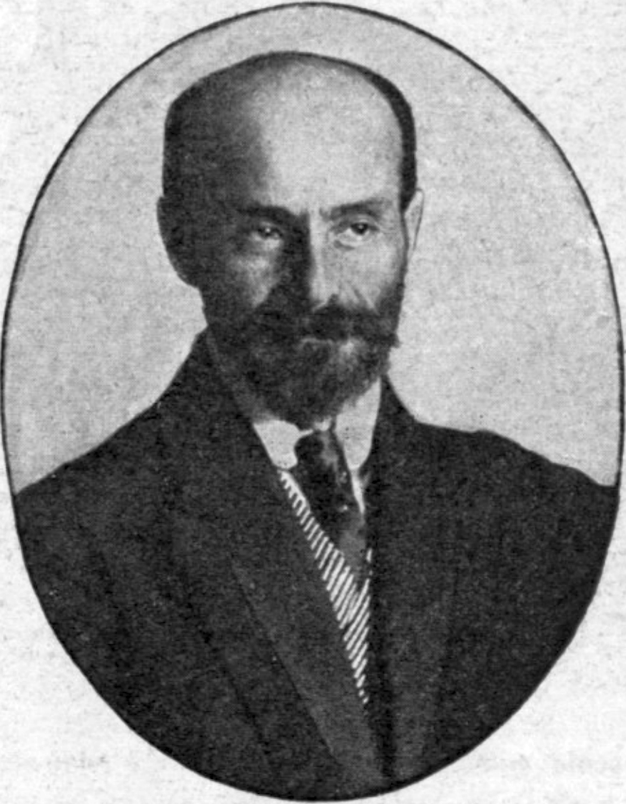 Гинцбург, Илья Яковлевич